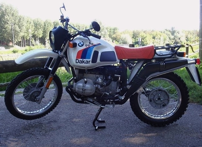 Belle R80 G/S Paris Dakar de 1985.